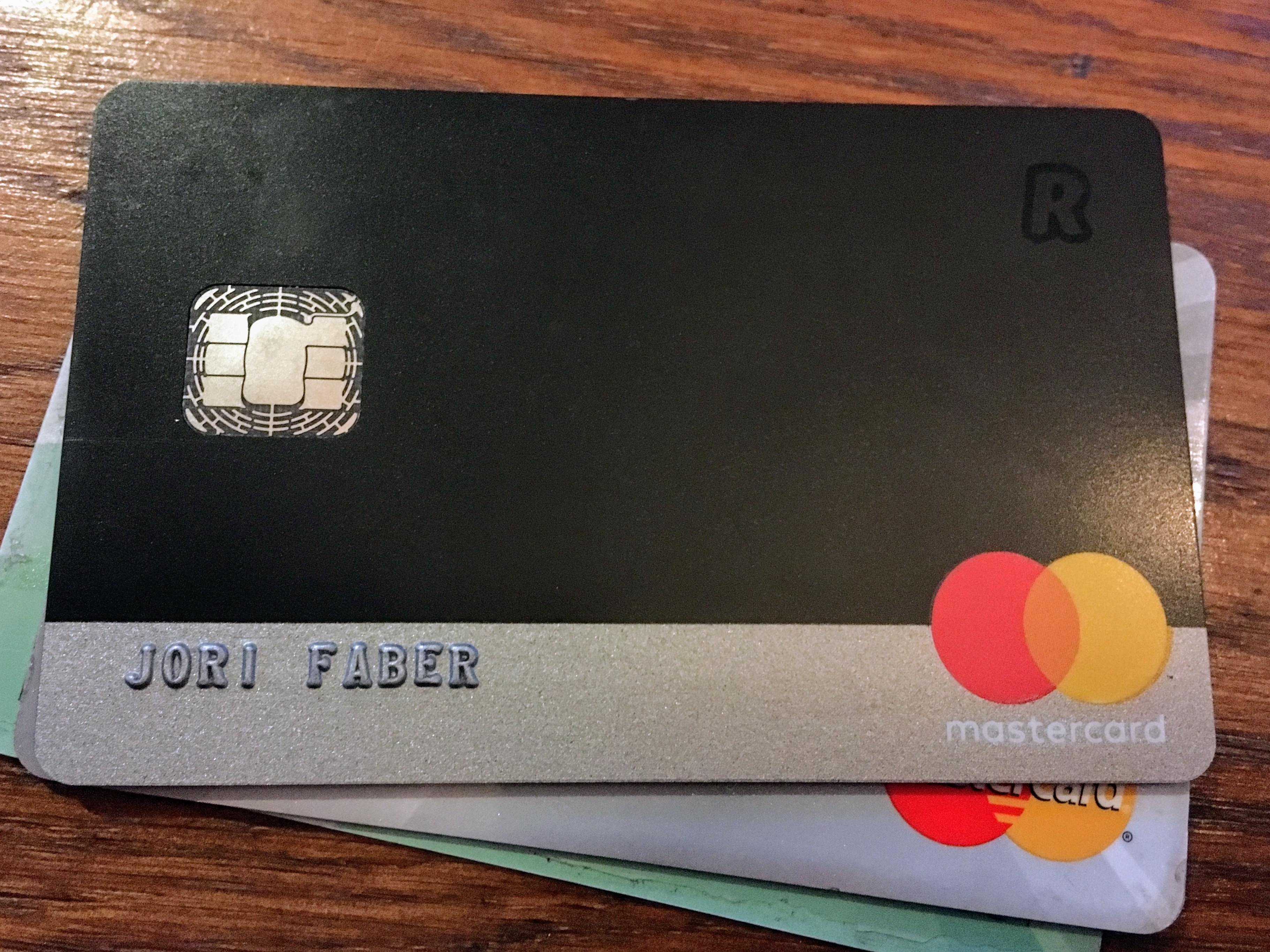 Prepaid credit card